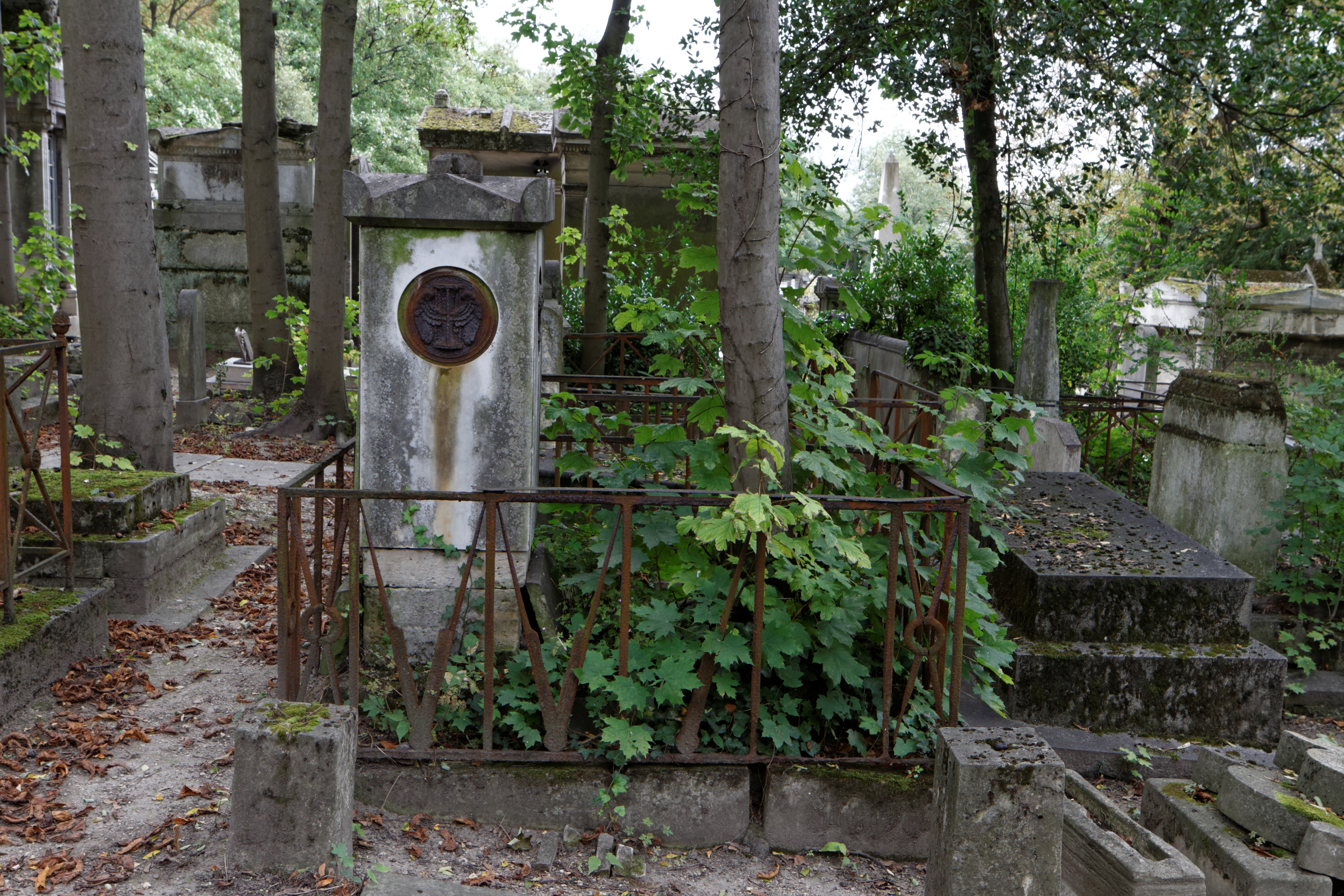 Sépulture de l'architecte Jacques Cellerier (1742-1814). Monument rectangulaire orné d'un médaillon en bronze.